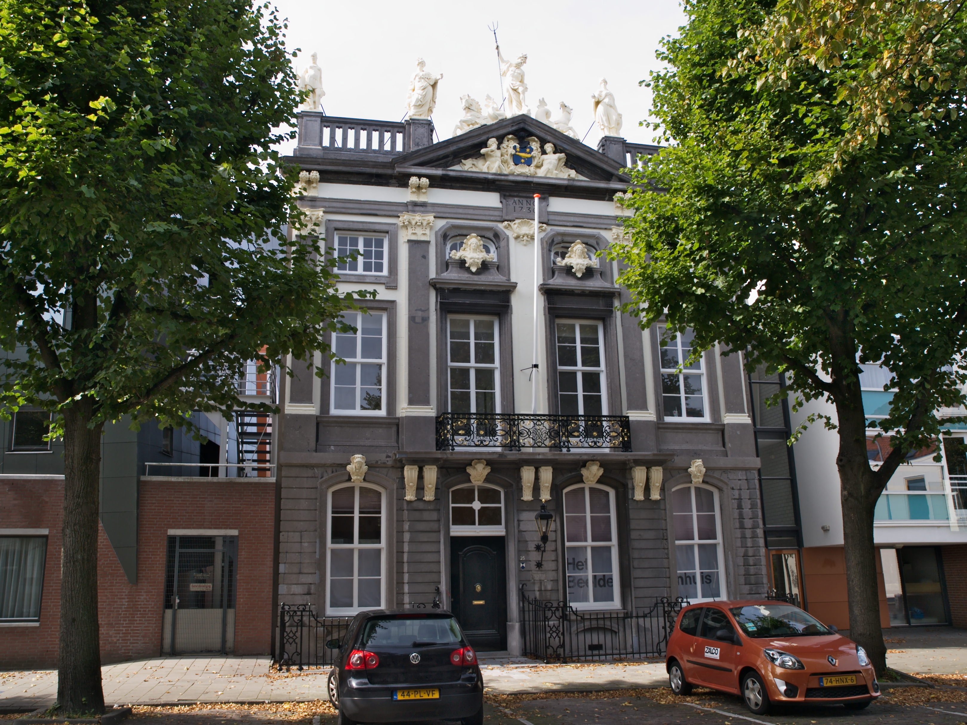 Rijksmonumenten Het Beeldenhuis aan de Hendrikstraat 25 te Vlissingen.